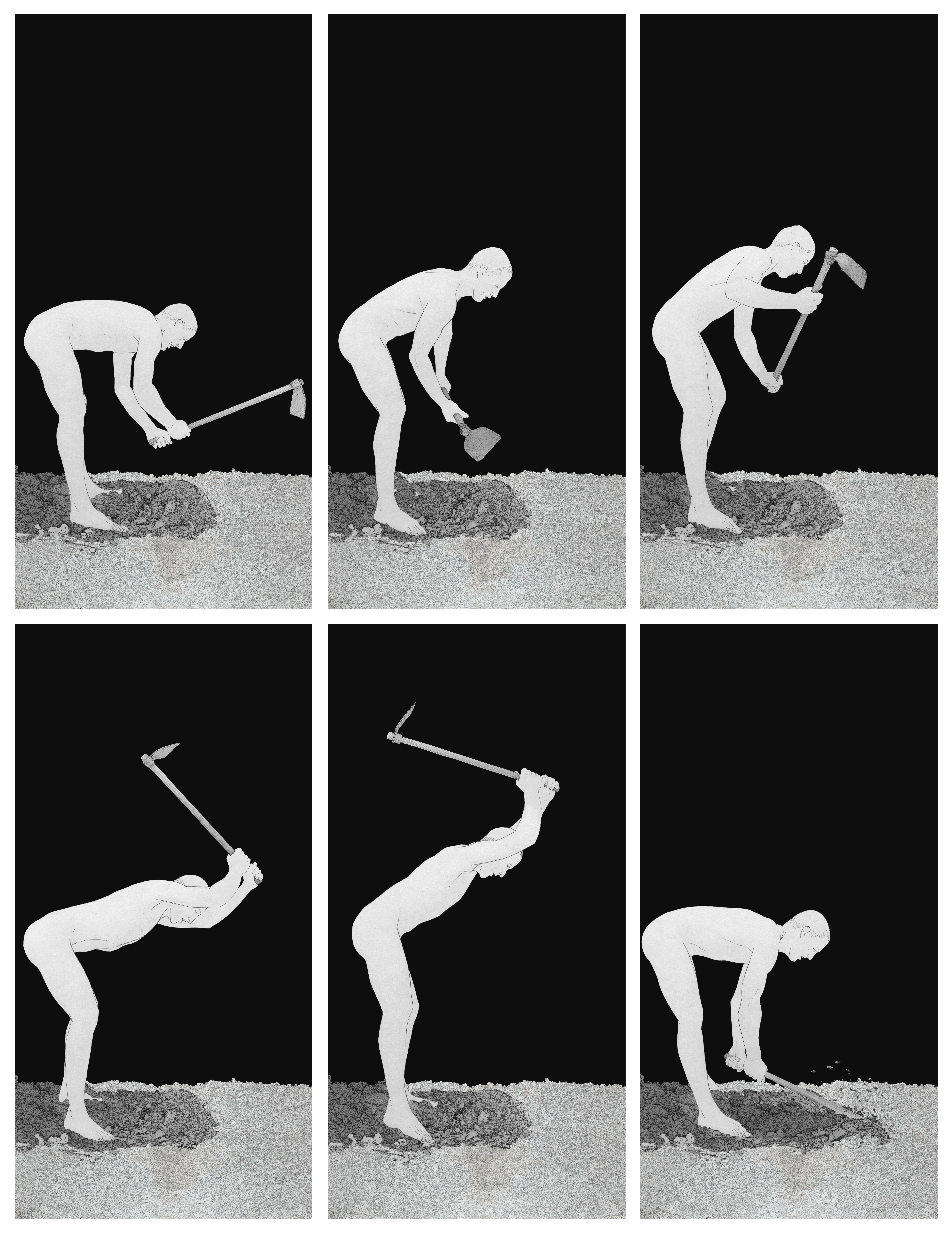 Imatges de l'exposició permanent "Horta i Marjal".